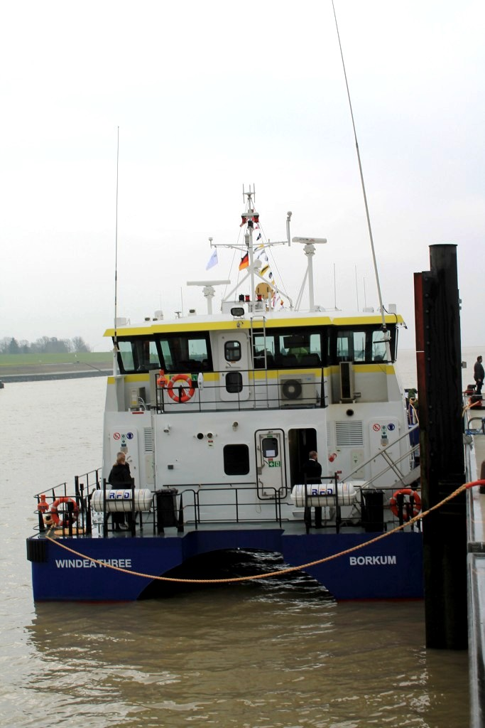 Die neue Windea Three wird in Emden getauft